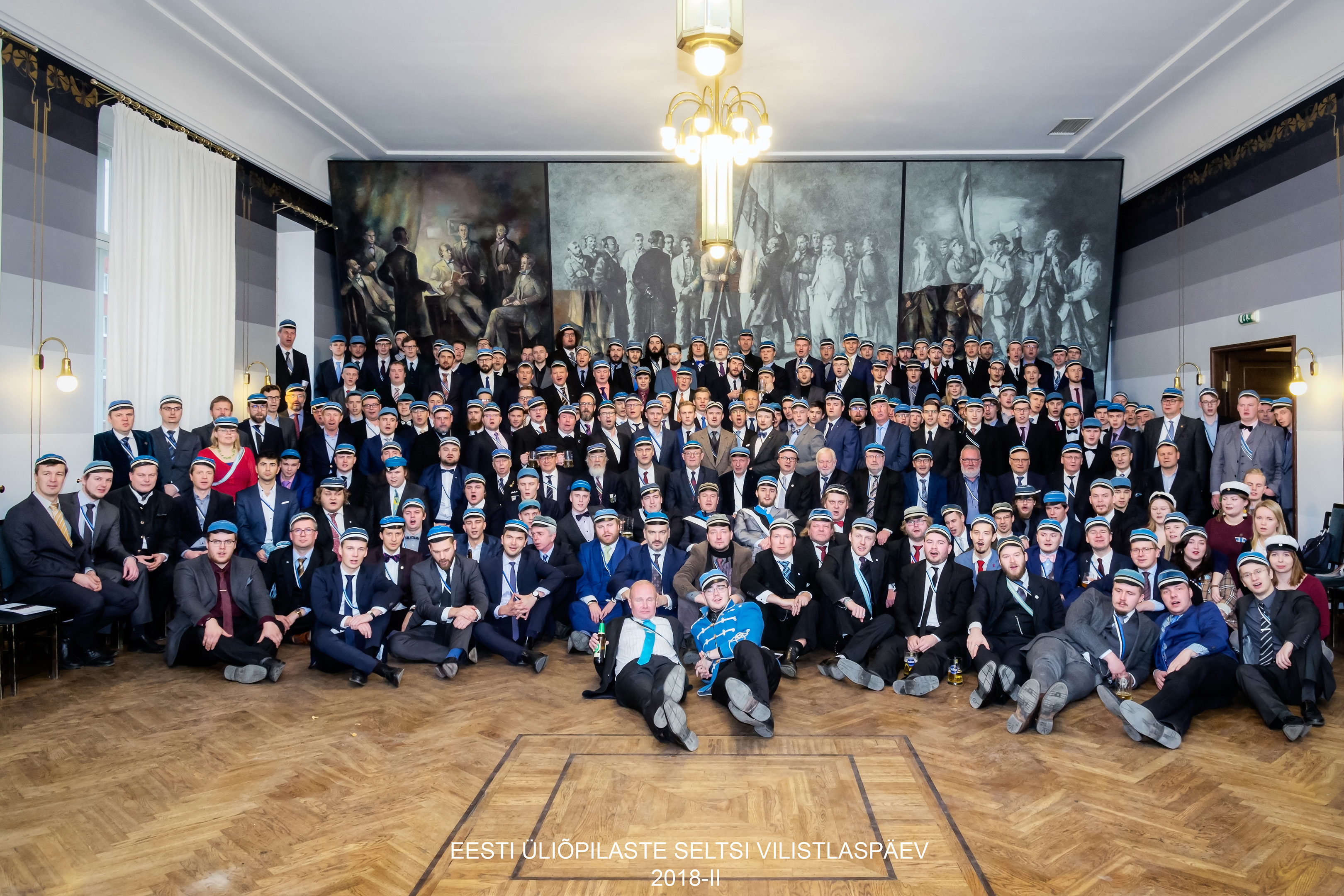 Eesti Üliõpilaste Seltsi vilistlaspäeva grupipilt.